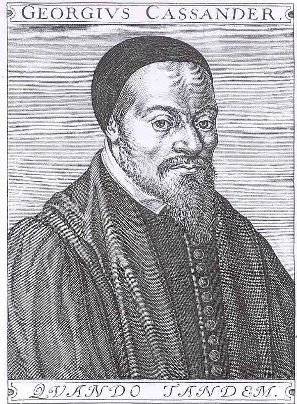 Georg Cassander (* 24. August 1513 in Brügge; † 3. Februar 1566 in Köln), deutscher Theologe